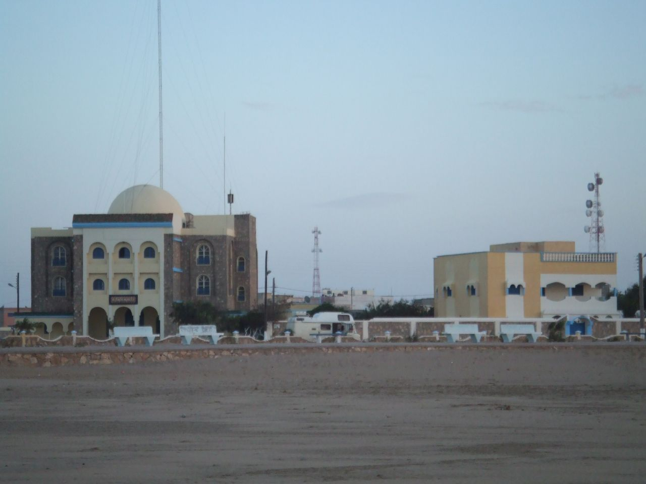 Paseo Marítimo en Tarfaya (Marruecos).